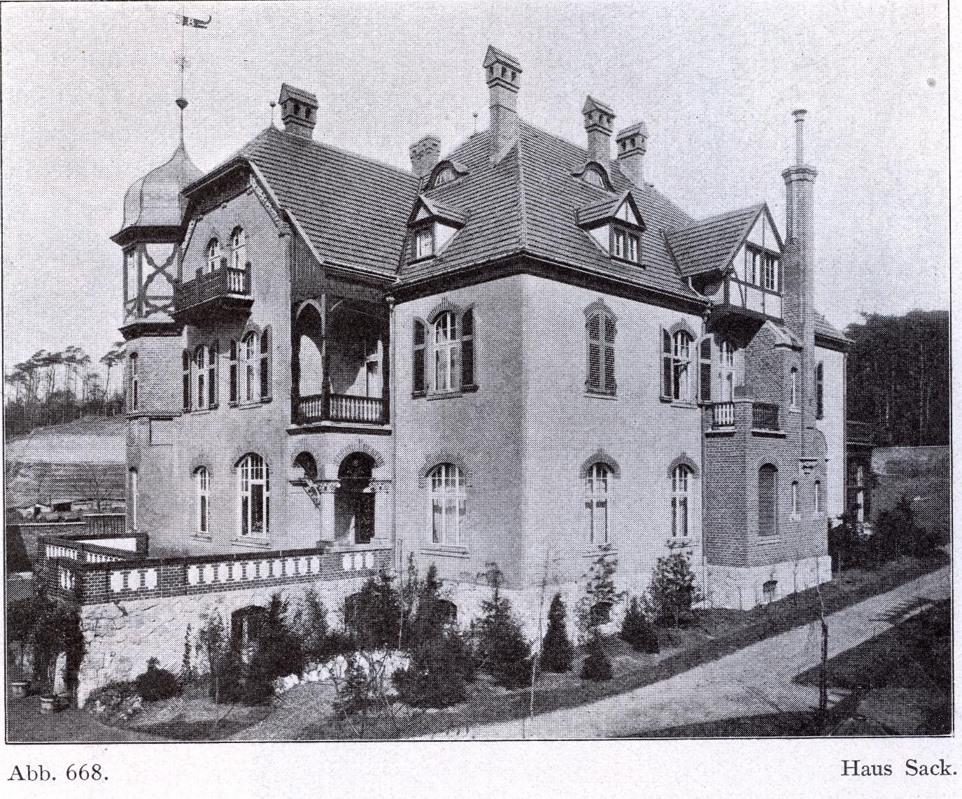 Haus Sack am Grafenberger Wald an der Straße nach Rath in Düsseldorf, erbaut vor 1904, Architekt Thilo Schneider.jpg